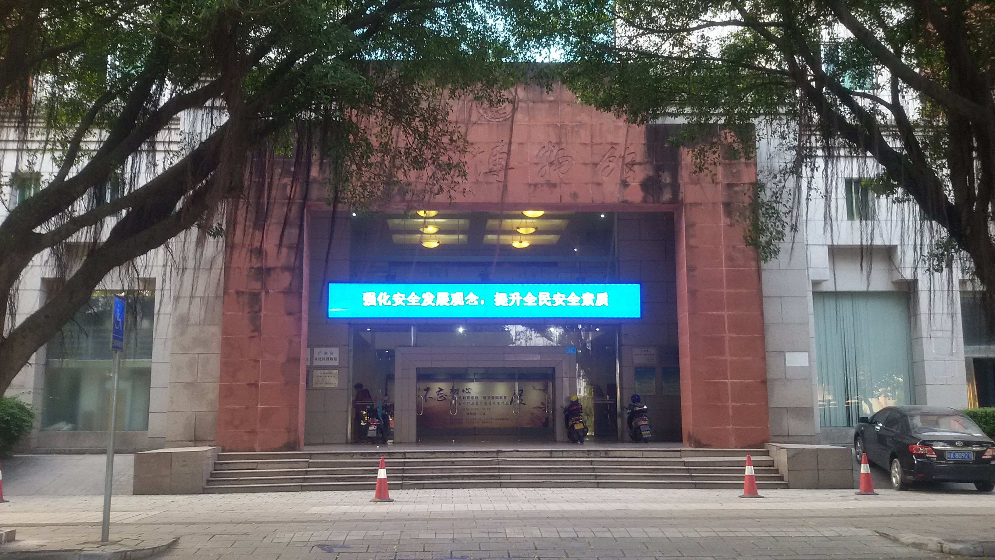 粵語: 從化博物館